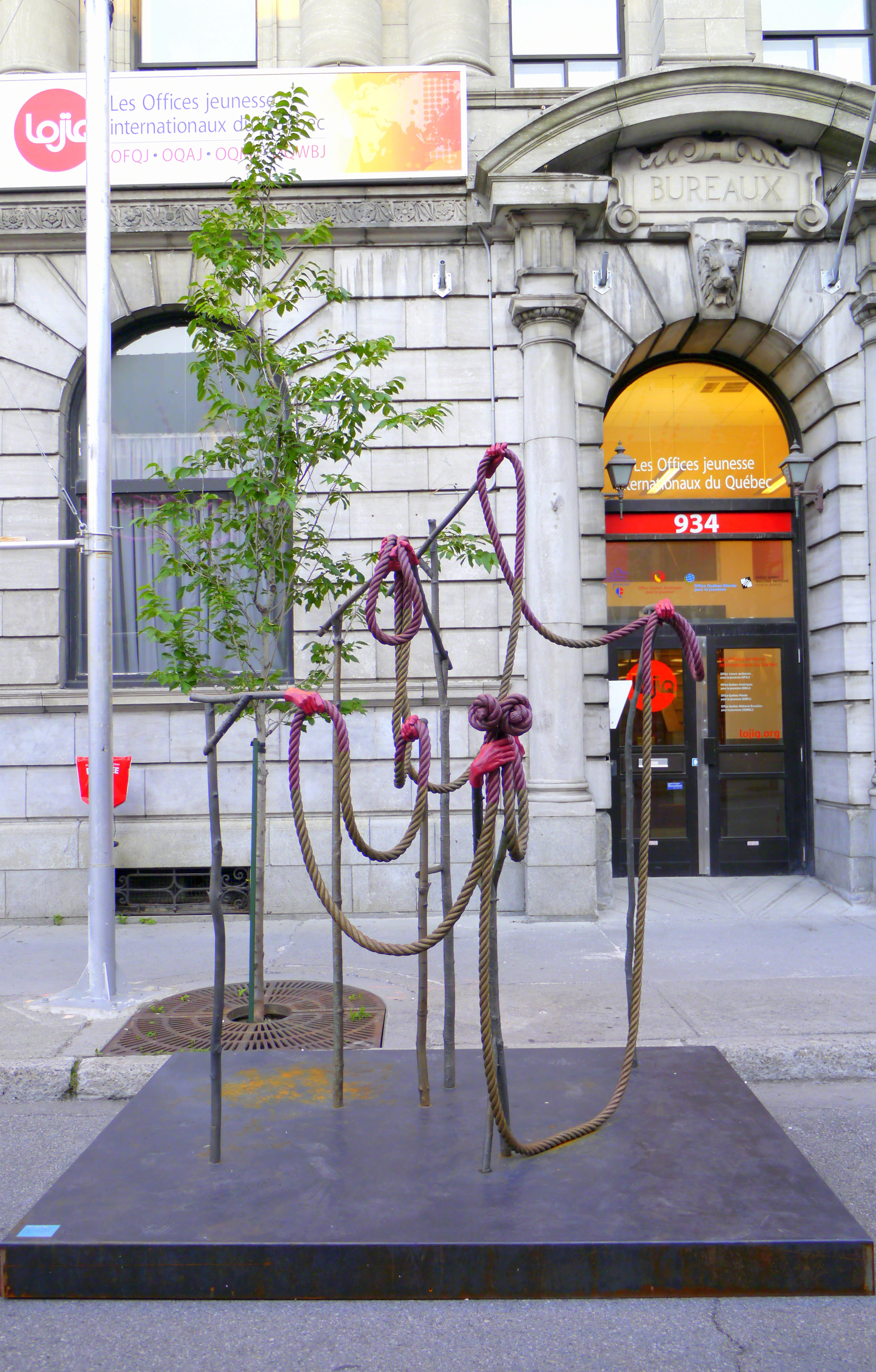 Aires Libres, rue Sainte-Catherine, Montréal Les sculptures de Valérie Blass sont le fruit de stratégies visant à tromper la reconnaissance des éléments figurés et à brouiller les réflexes de projection narrative. Par des jeux d’anthropomorphismes et d’interchangeabilité formelle, l’artiste évacue la distinction entre abstraction et figuration pour mettre de l’avant une ambivalence, voire une surenchère de sens, qui fait basculer les points de repères du spectateur. Dans le cadre d’Aires Libres 2014, Blass présente Rope dope grope nope pope. À travers ce grand dessin de cordes dans l’espace apparaissent des mains, incarnant l’action, la volonté et le caractère, qui soulignent la malléabilité sémantique et la posture particulière qui se dégagent de la structure en suspension. L’intérêt de l’artiste pour la déconstruction du corps et la présentation d’éléments isolés, ici les mains, participe d’une recherche continue sur les synecdoques, sur la manière dont la partie renvoie au tout. Ces mains deviennent ainsi des corps partiellement invisibles, en tension avec la grande souplesse des cordes déployées. Comme dans de nombreuses oeuvres de l’artiste, la matière semble procéder d’un élan intérieur, d’un mouvement inconnu qui évoque une forte intention. Valérie Blass est représentée par la Galerie Parisian Laundry à Montréal. Depuis plus de dix ans, ses œuvres sont présentées à l’échelle nationale et internationale et font partie de nombreuses collections publiques et privées. Sa première expo solo à New York en 2013 à la galerie The Hole a été saluée par la critique. Rope dope grope nope pope est la première œuvre d’art public canadienne de Valérie Blass. Elle vit et travaille à Montréal. Aseman Sabet Commissaire